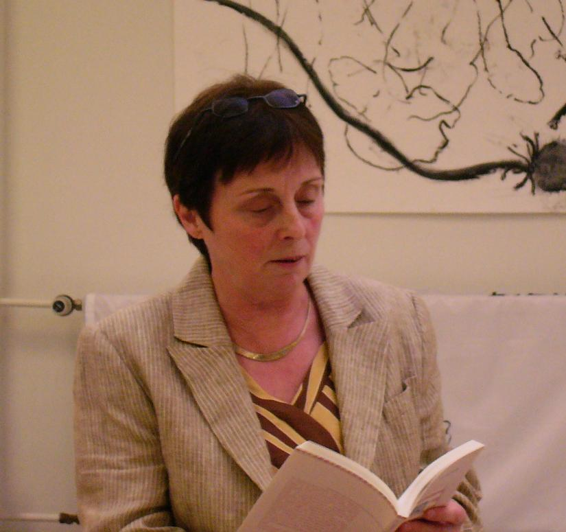 Els Diederen (Els Diederen) bie de presentatie van häöre diechbundel Sjakelt de zinne in juni 2006 foto door Cicero